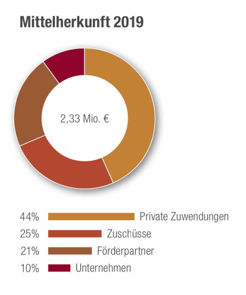 Herkunft der Mittel 2019 der Stiftung Childaid Network